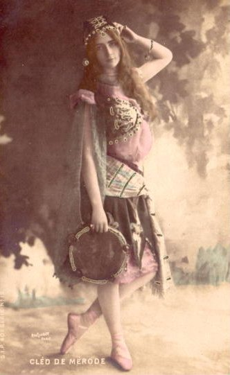 Cléo de Mérode, franz. Tänzerin, Aufnahme von ca. 1897